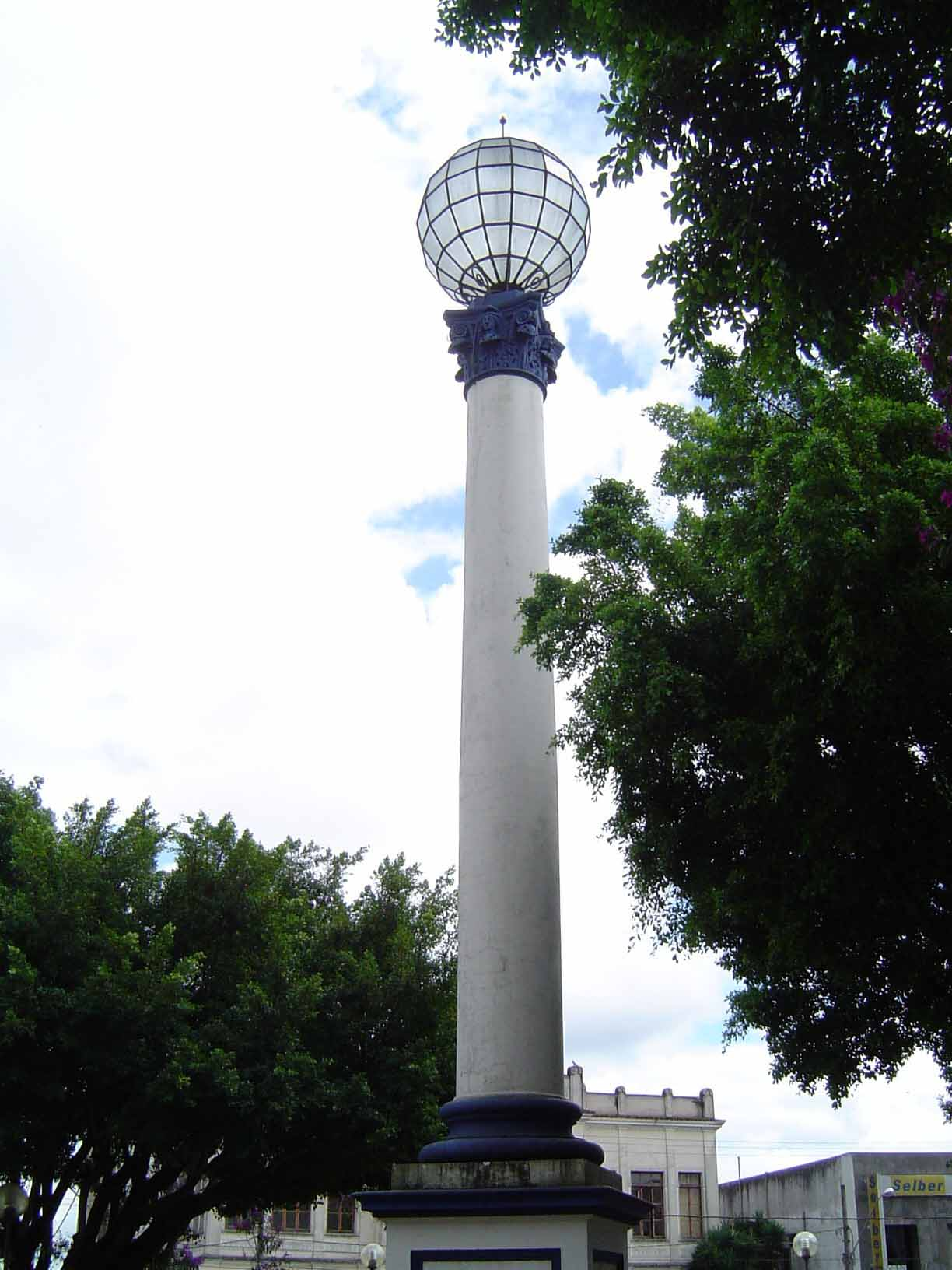 Praça_Conde_de_Prados Barbacena